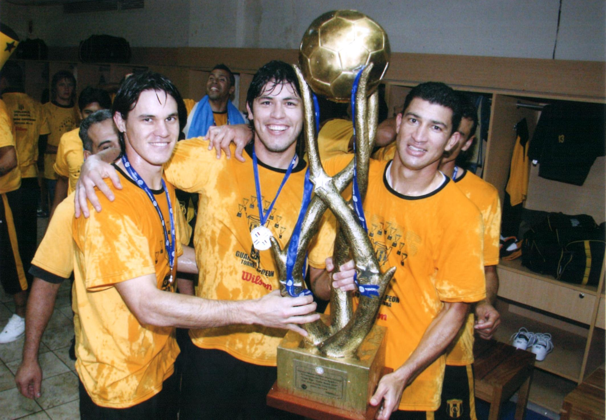 Festejo en el vestuario aborigen entre Paulo Centurion, Joel Benítez y Eduardo Filippini tras la obtencion del titulo de Campeon conseguido por el Club Guarani en el Torneo Apertura 2010 de la Asociación Paraguaya de Fútbol